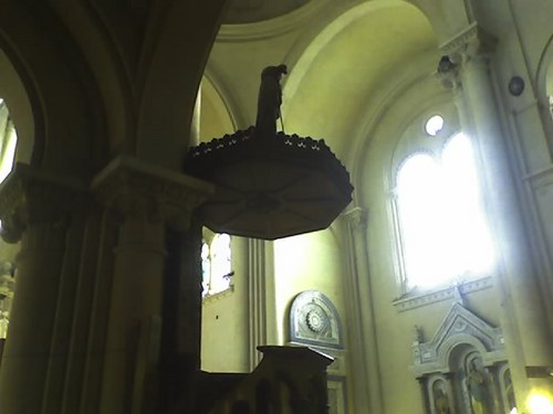 Interior de la iglesia de Padua Merlo Provincia de Buenos Aires.